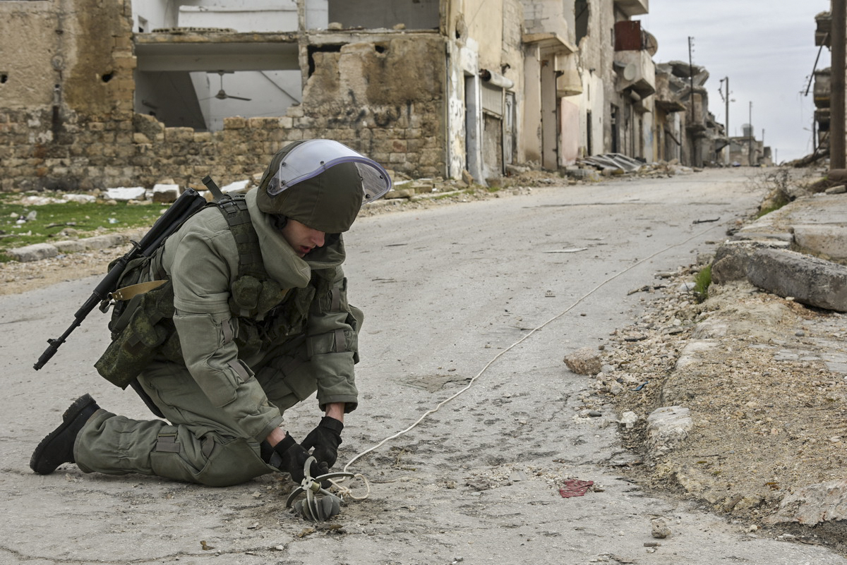 Работа сапёров Международного противоминного центра Министерства обороны России в Алеппо (Сирия)